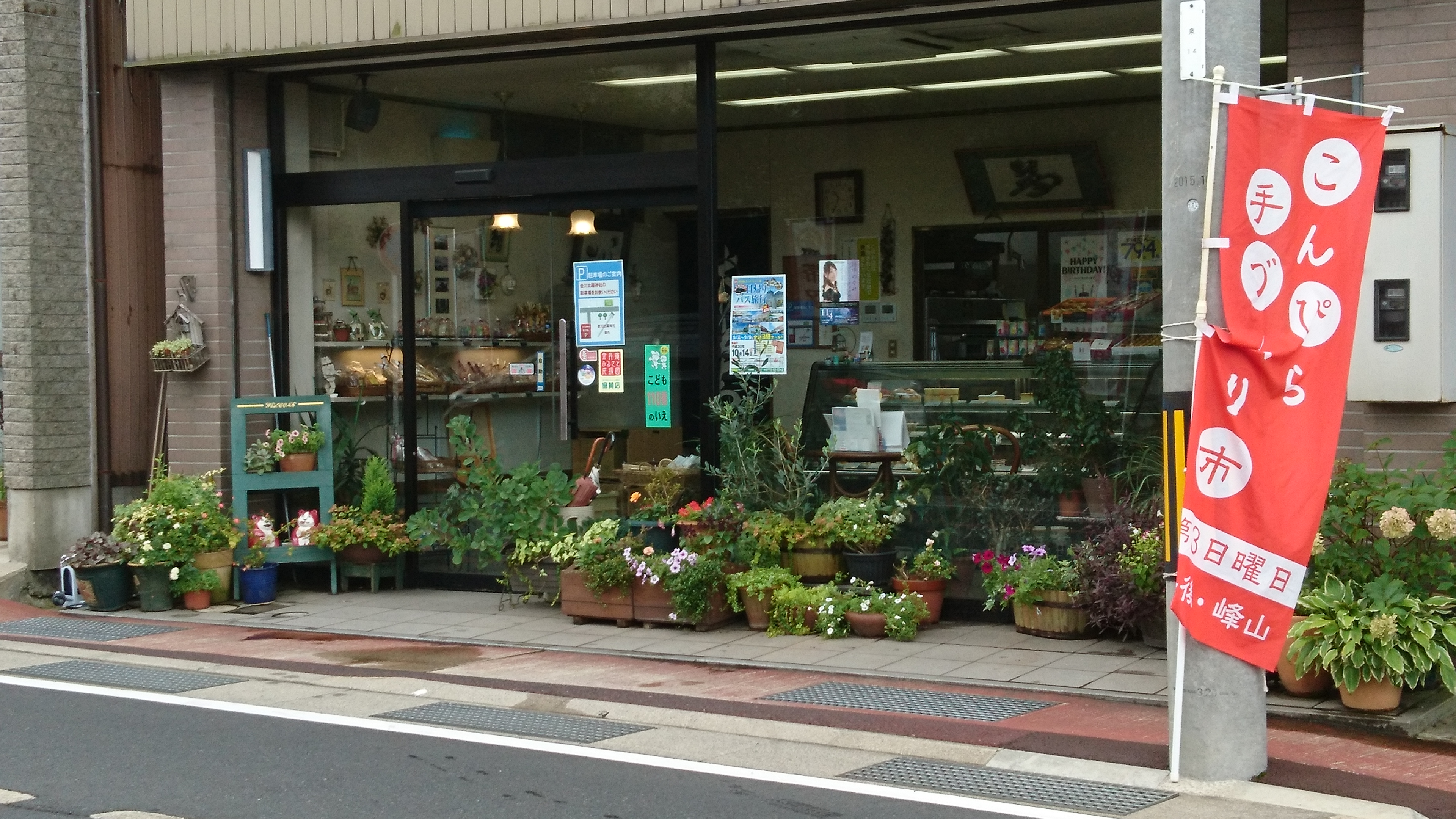 まちなかエリアの菓子店（入口の左に赤白に絵付けされた素焼き狛猫が飾られている。）